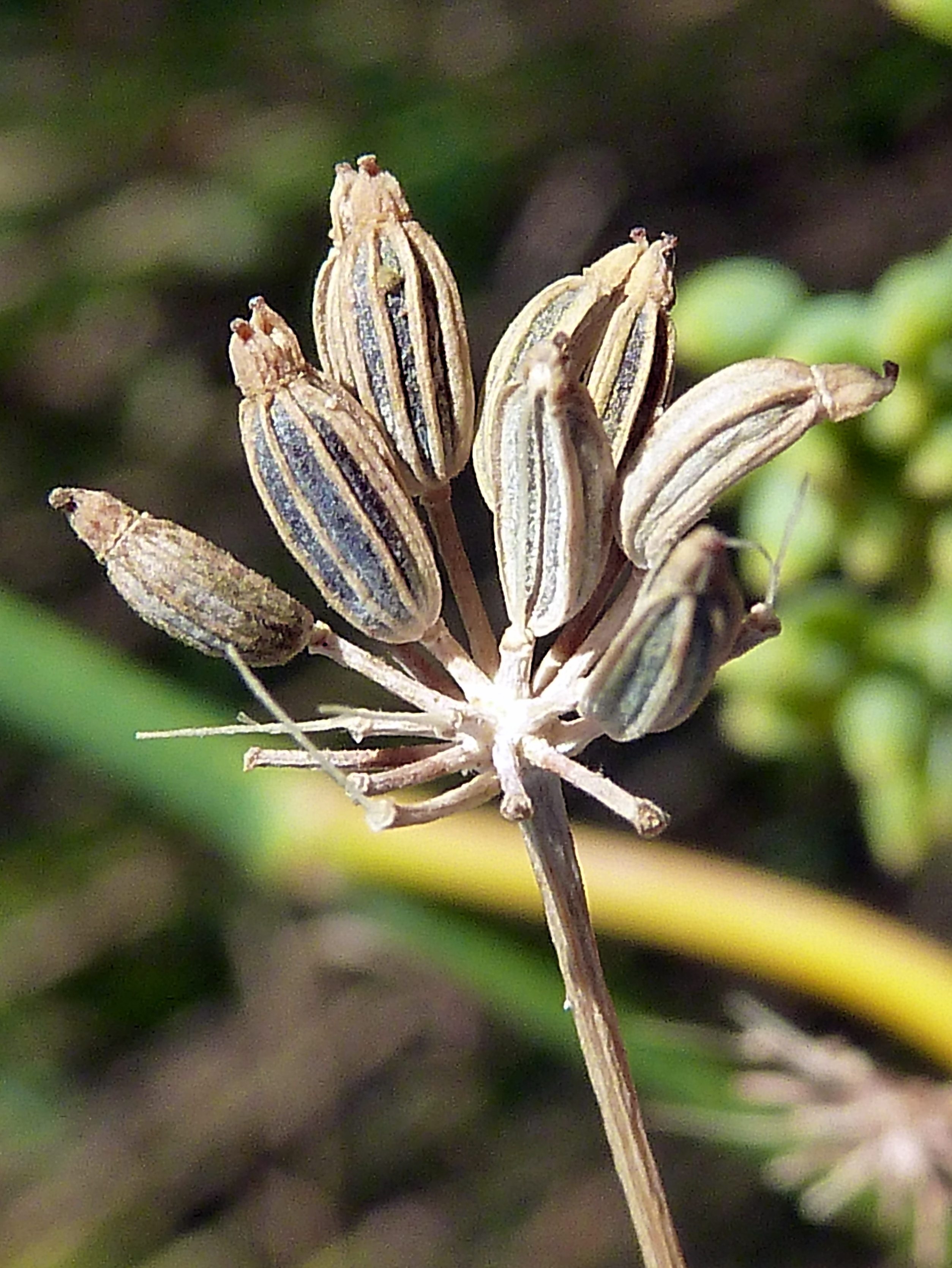 Foeniculum vulgare Mill. (Hinojo): frutos de dos mericarpios monospermas in situ - Albatera, Camino de la Azarbe de (San) Patricio (Alicante, España).